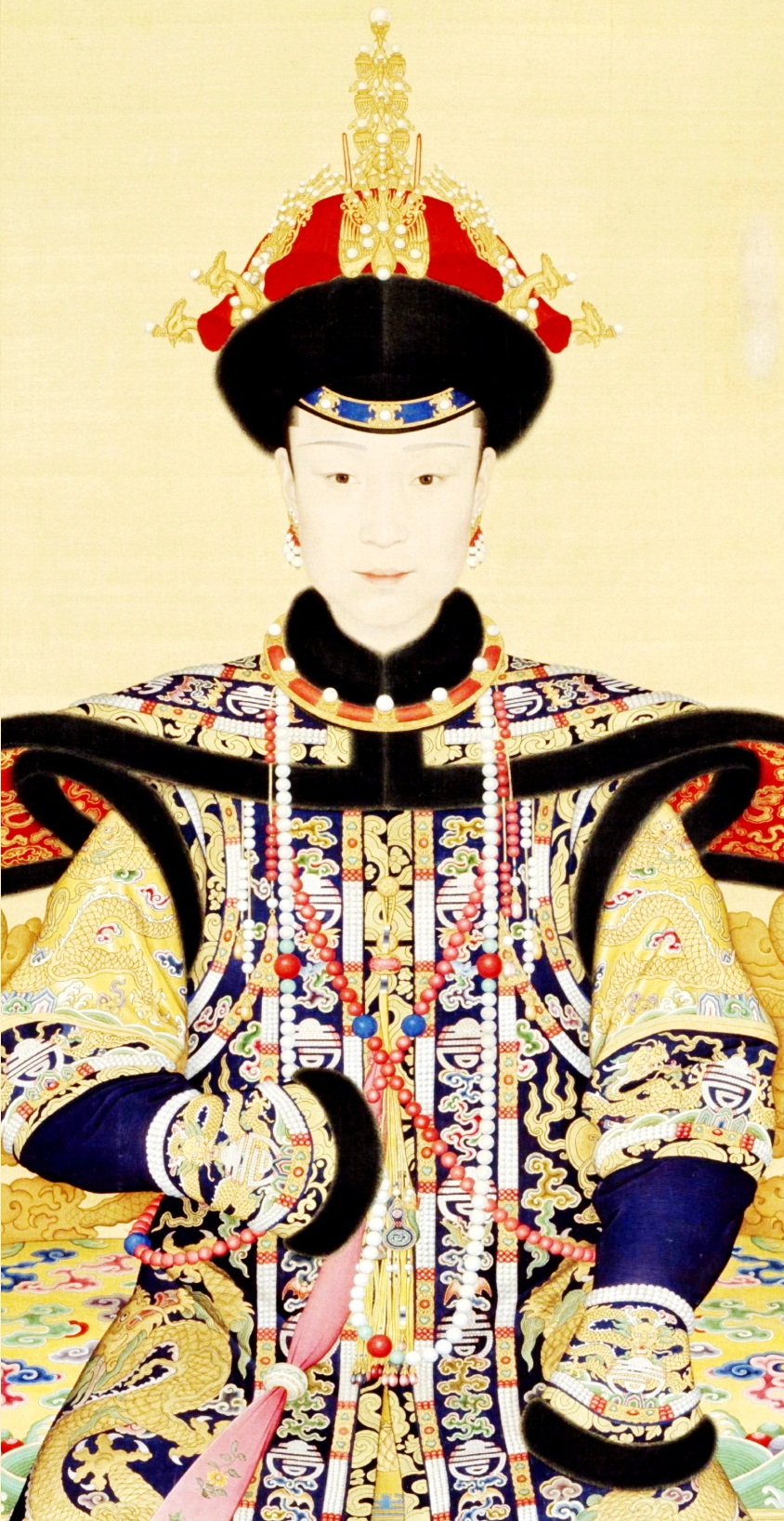 孝贤纯皇后朝服像局部